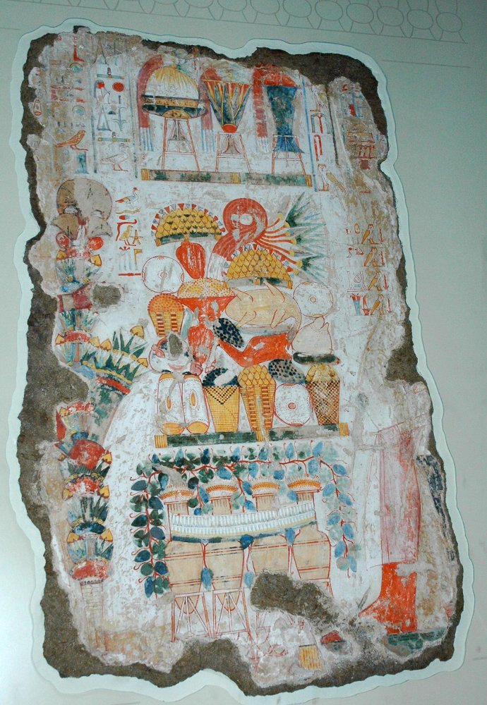 Opferszene aus der heute verschollenen Grabkapelle des Nebamun, heute im British Museum (BM EA 37985), aus der Zeit von Amenophis III. (18. Dynastie, ca. 1350 v.Chr.)